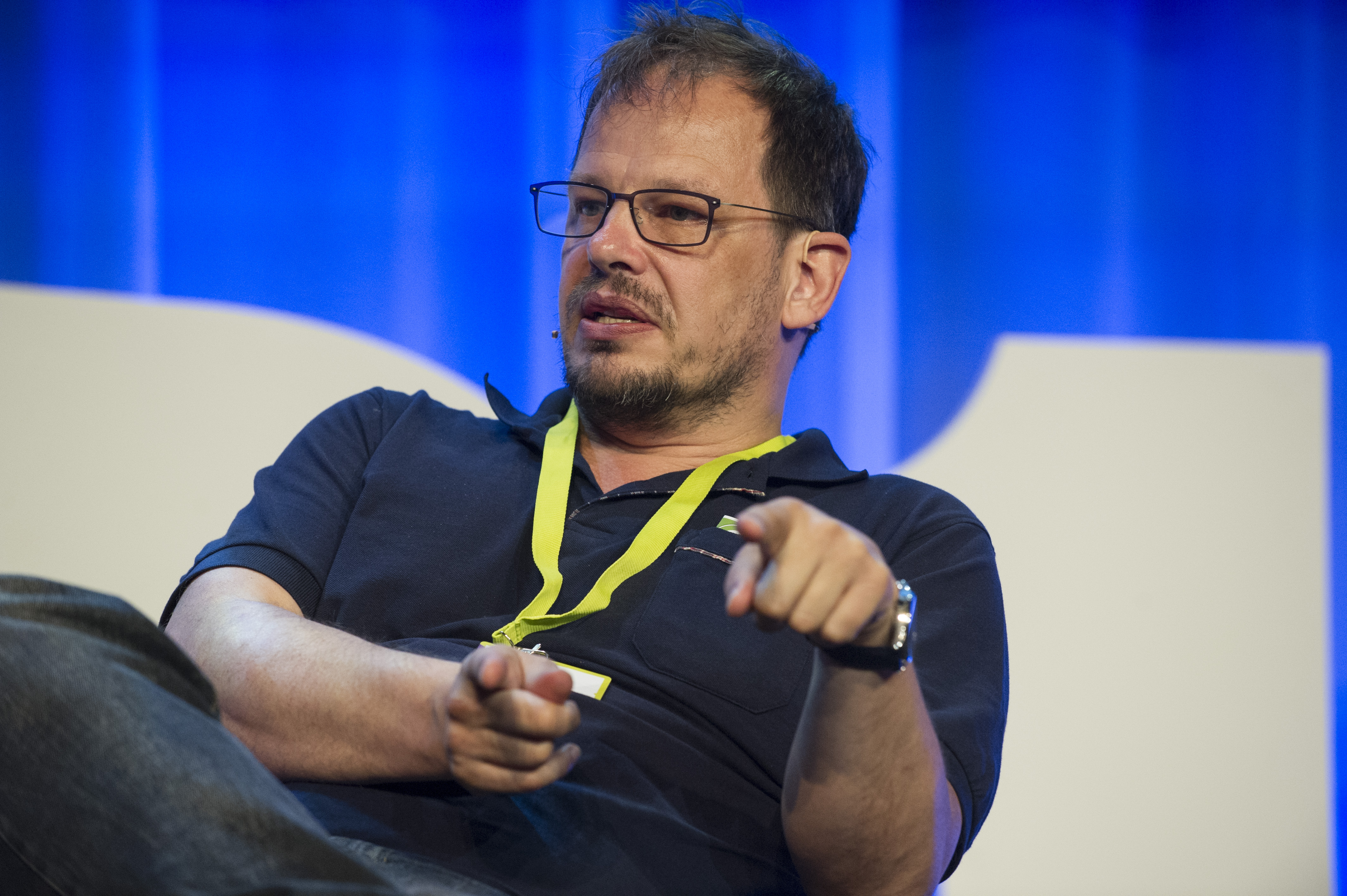 Medvirkende: Hajo Seppelt.Moderator: Leif Welhaven